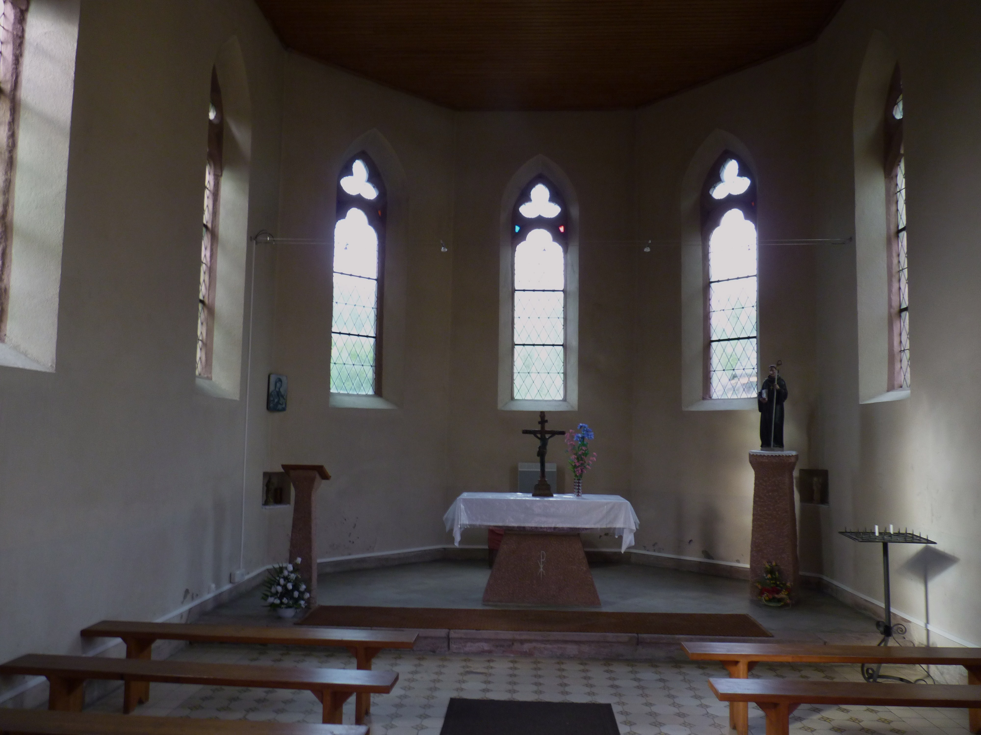 La nef de la Chapelle